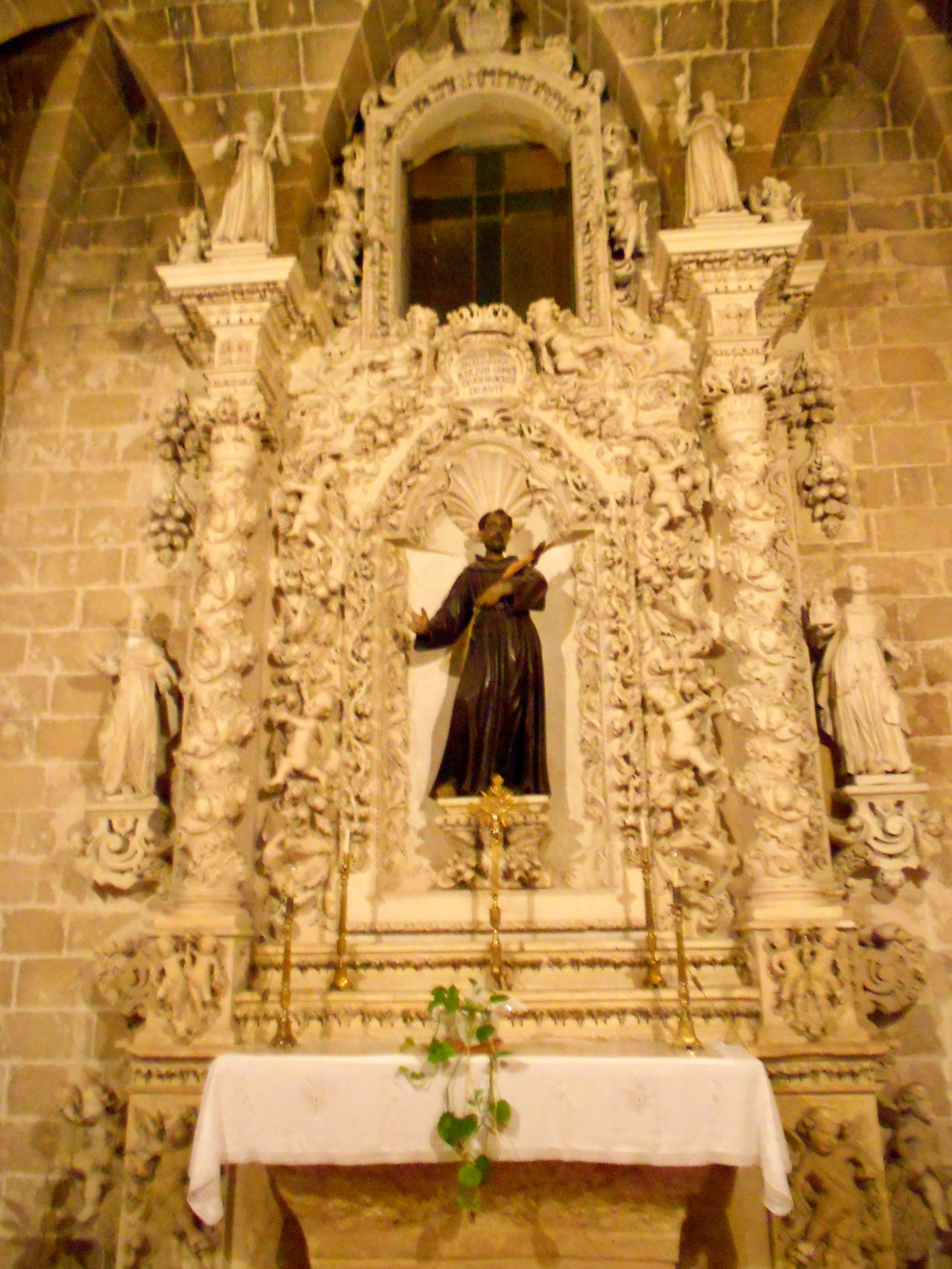 Convento di Santa Maria delle Grazie, altare di San Francesco